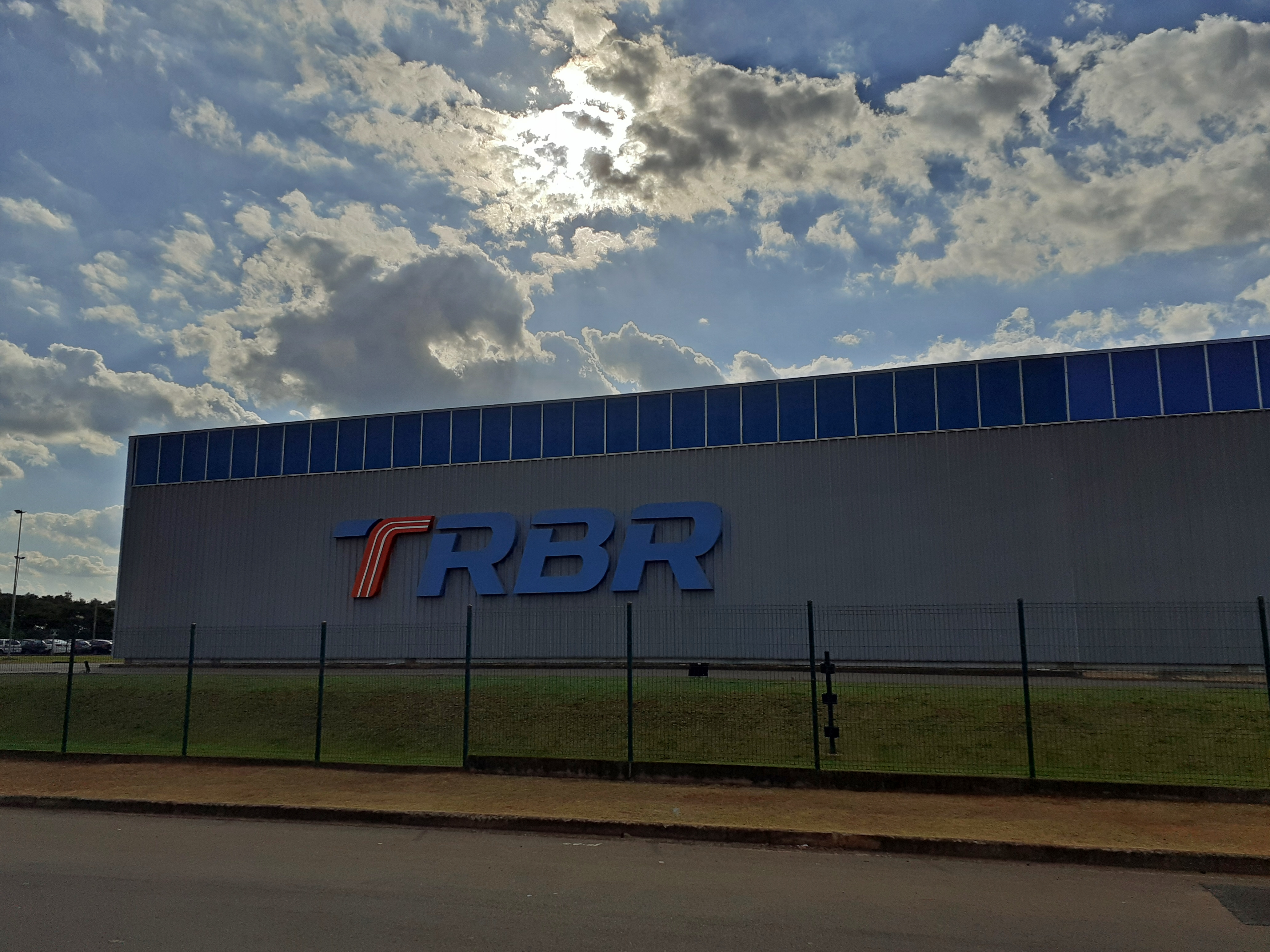 TRBR de Santa Bárbara d'Oeste